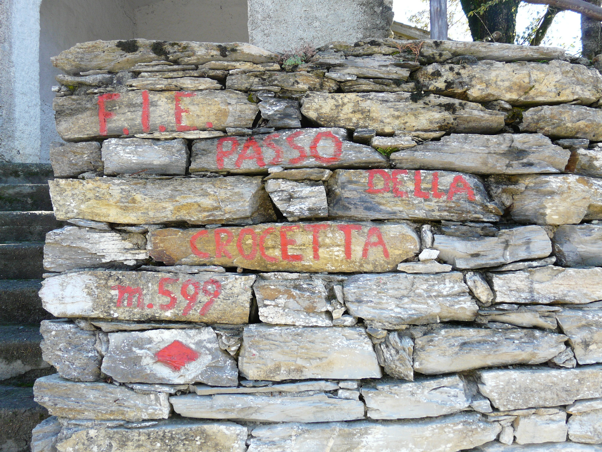 Passo della Crocetta, lungo la strada provinciale 58 della Crocetta (Rapallo-Coreglia Ligure), Liguria, Italia